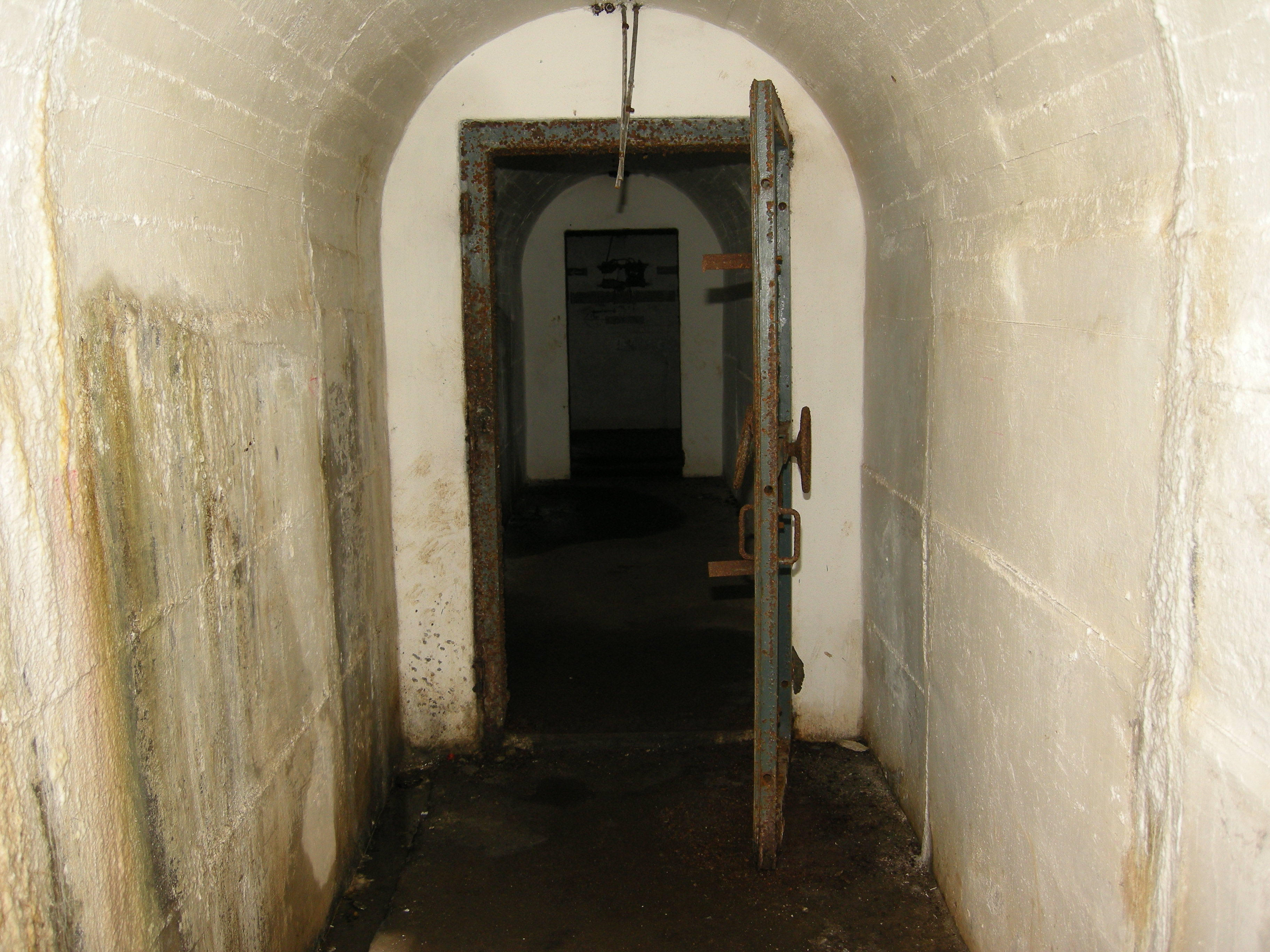 Sas de l'entrée du personnel. Salbert hill fortifications. Old NATO station.